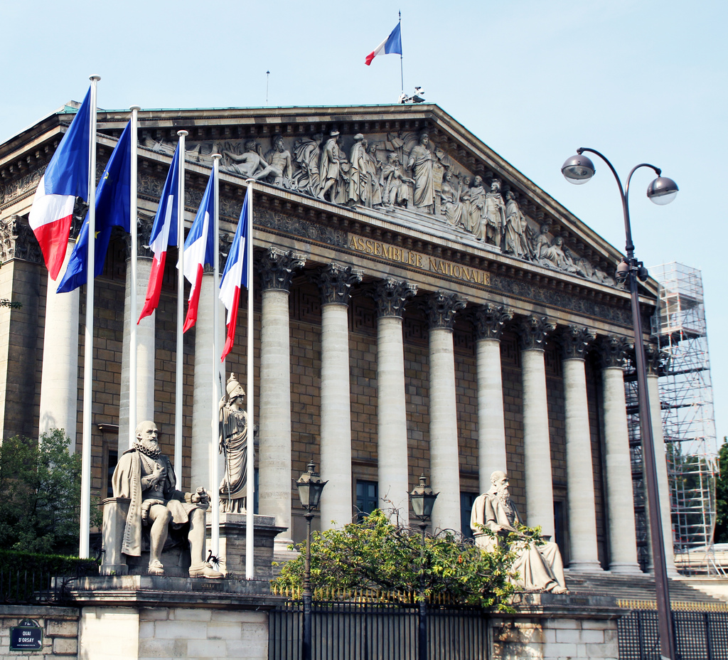 image